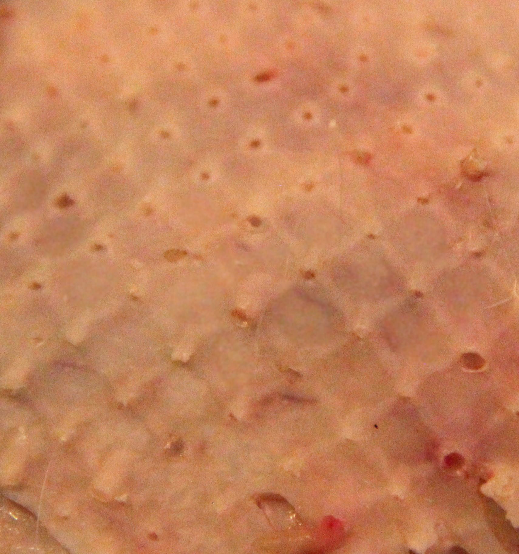 Huid van een geplukte haan met rangschikking der veren